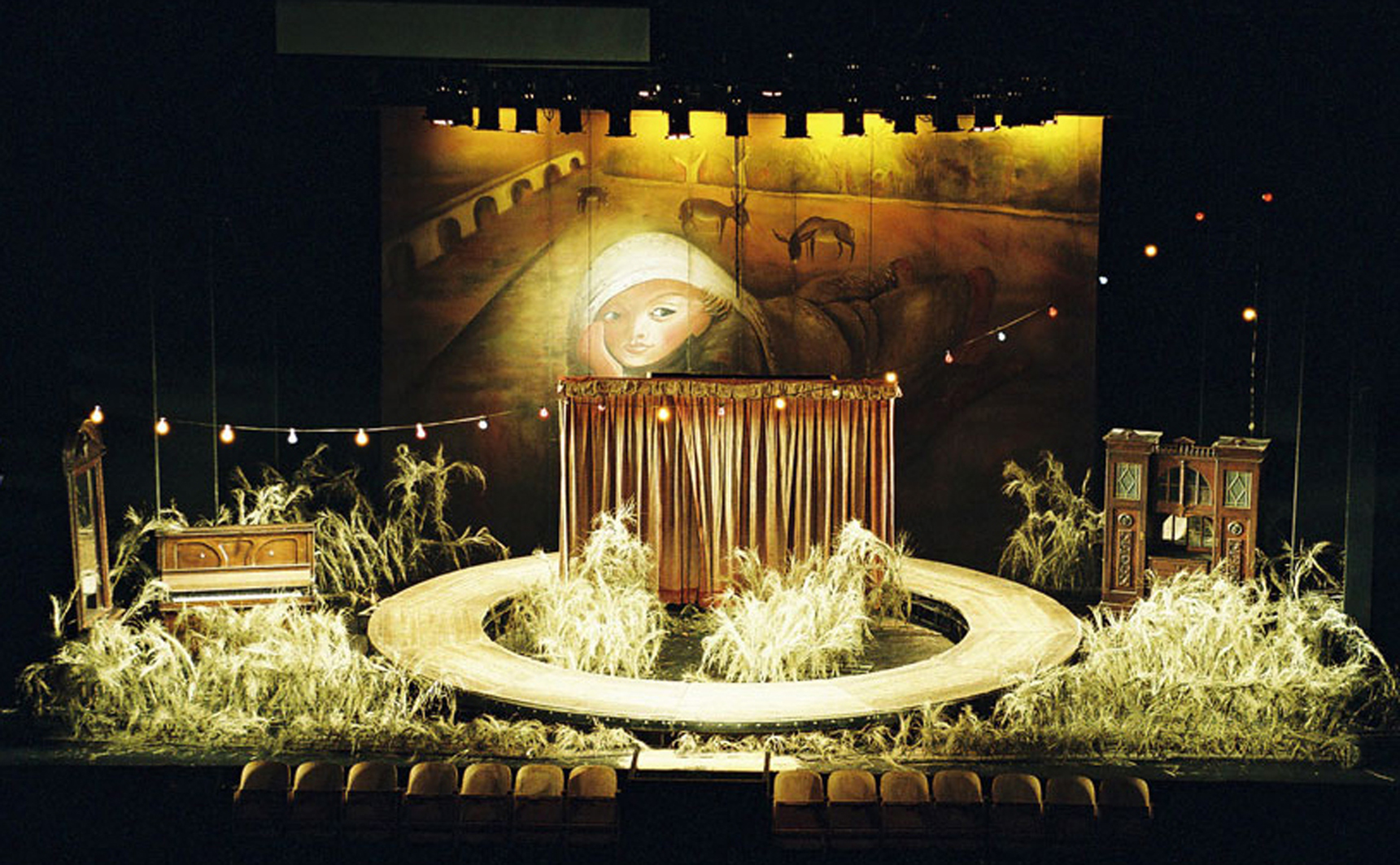 ההצגה כפר, תיאטרון גשר